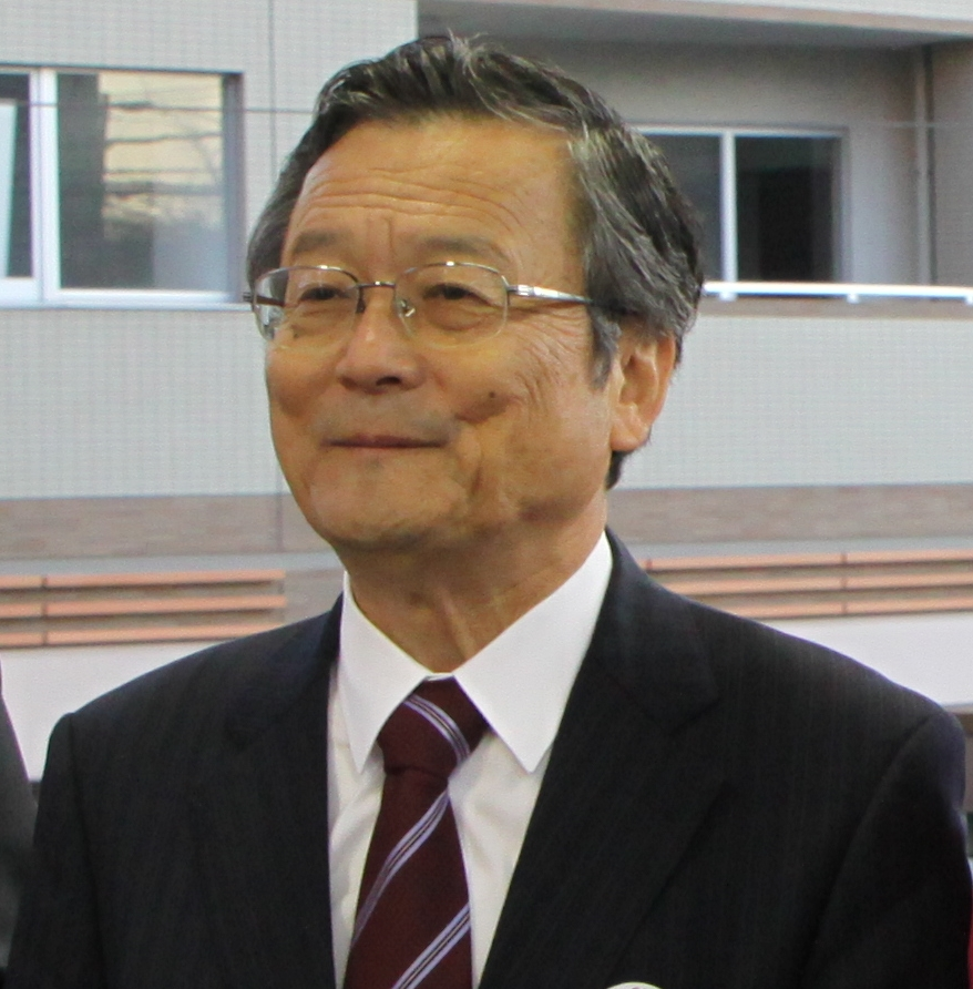 稲葉孝彦